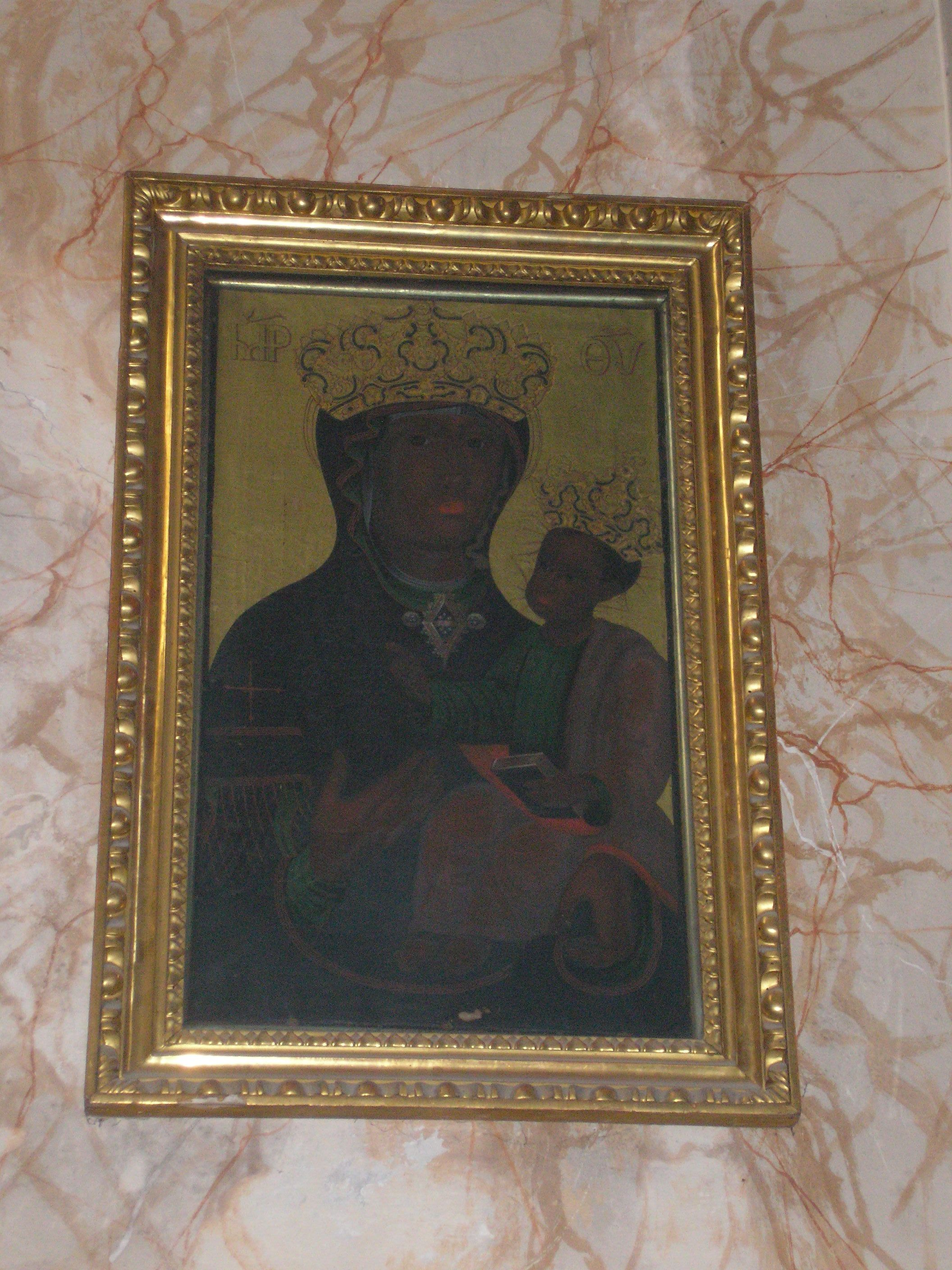 Fekete Madonna (Szerb ortodox templom, Szeged)